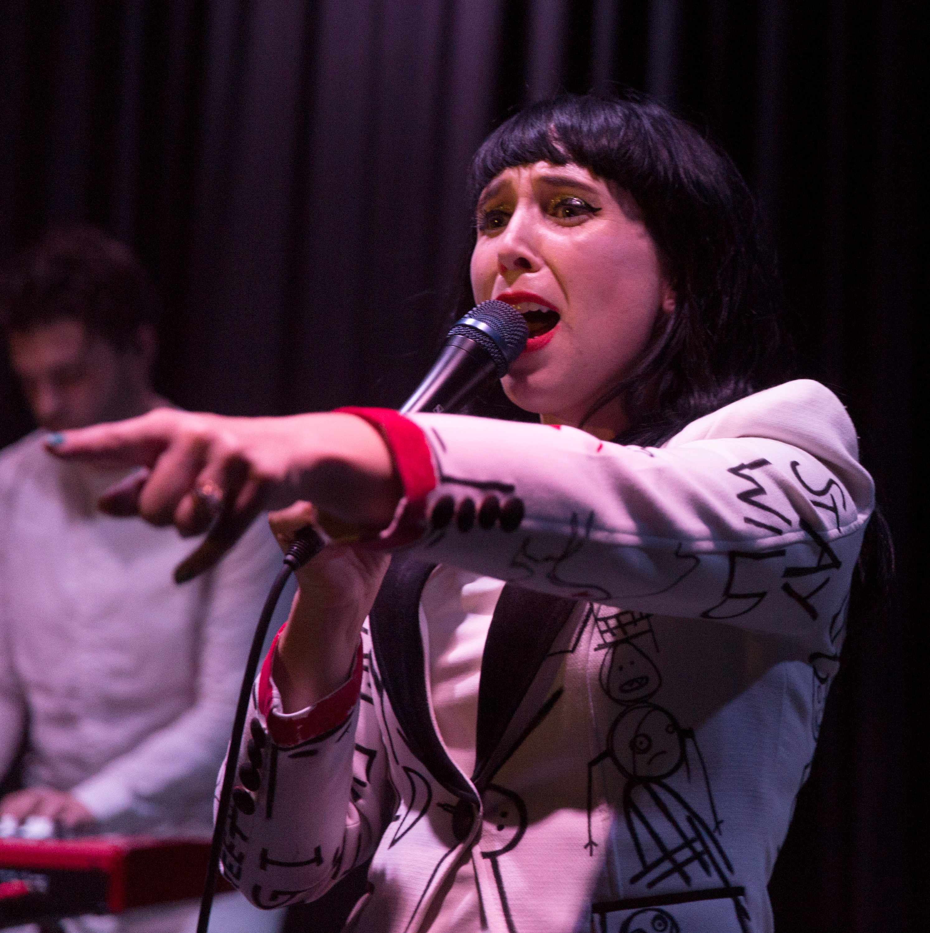 Katy Steele